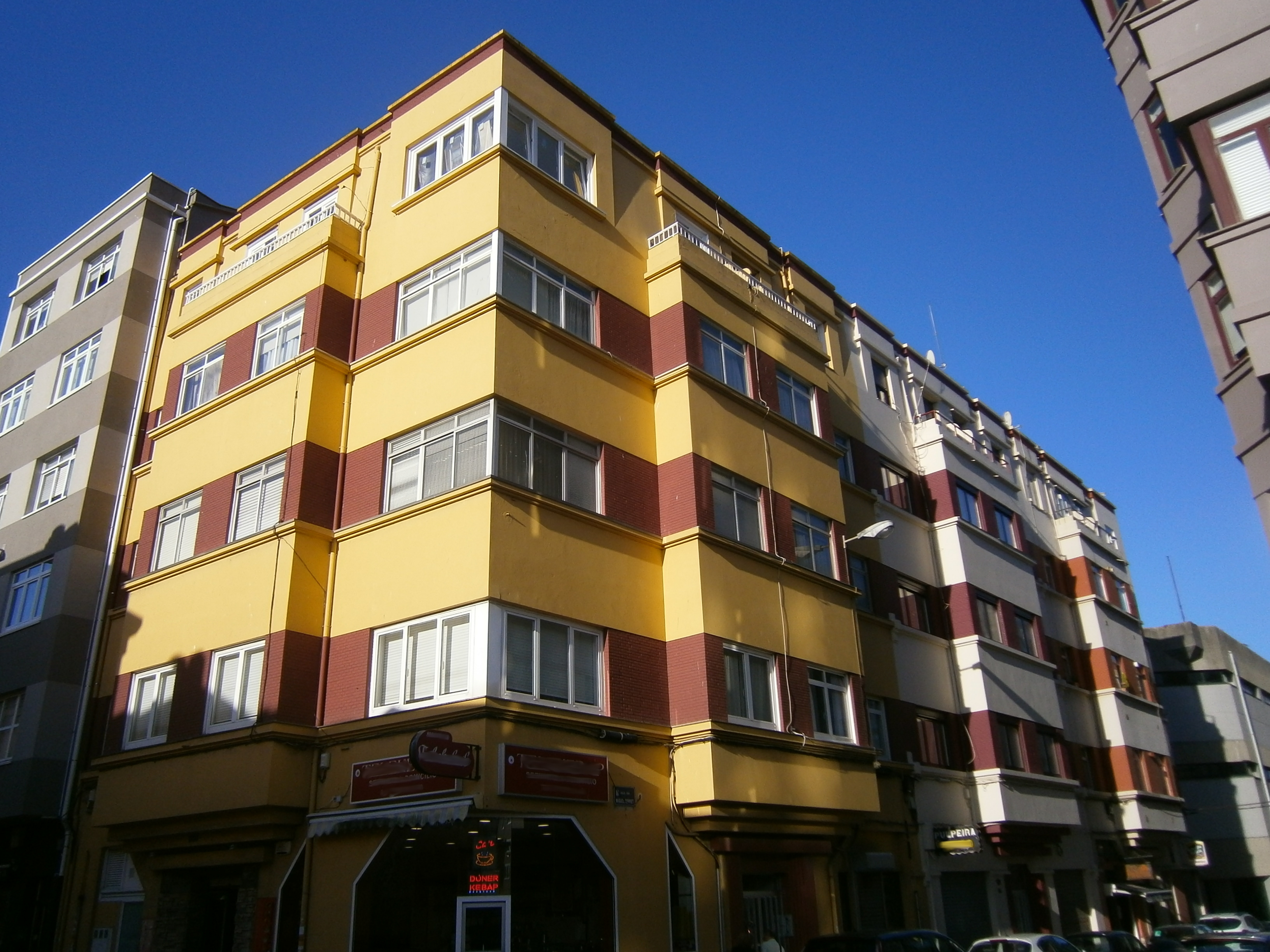 Edificio art deco na rúa da Torre da Coruña, de Peregrín Estellés